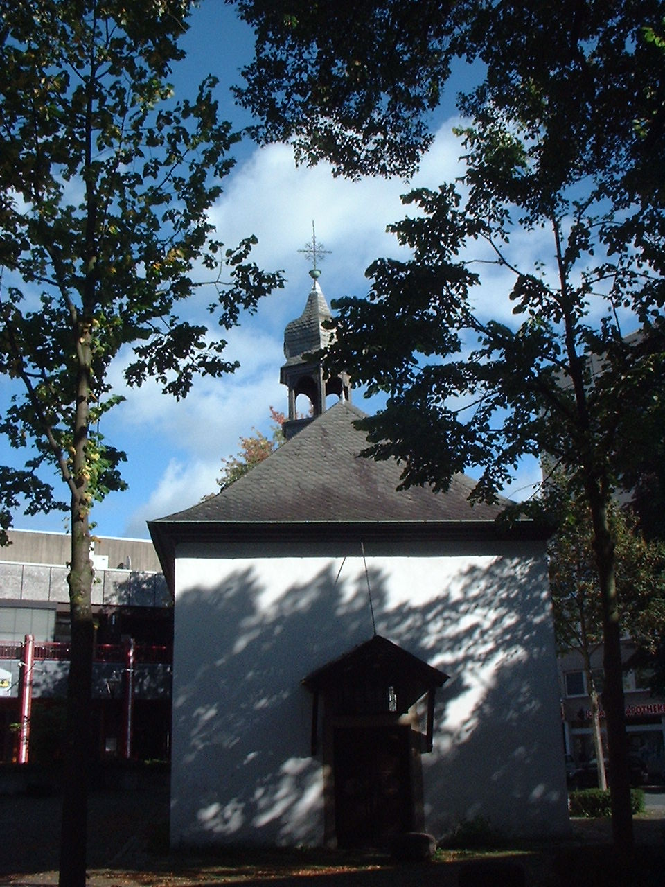 Kapelle am Brückencenter, Arnsberg